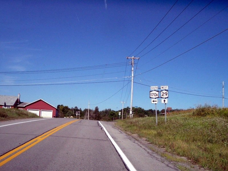 NY 170A, nr. Fairfield